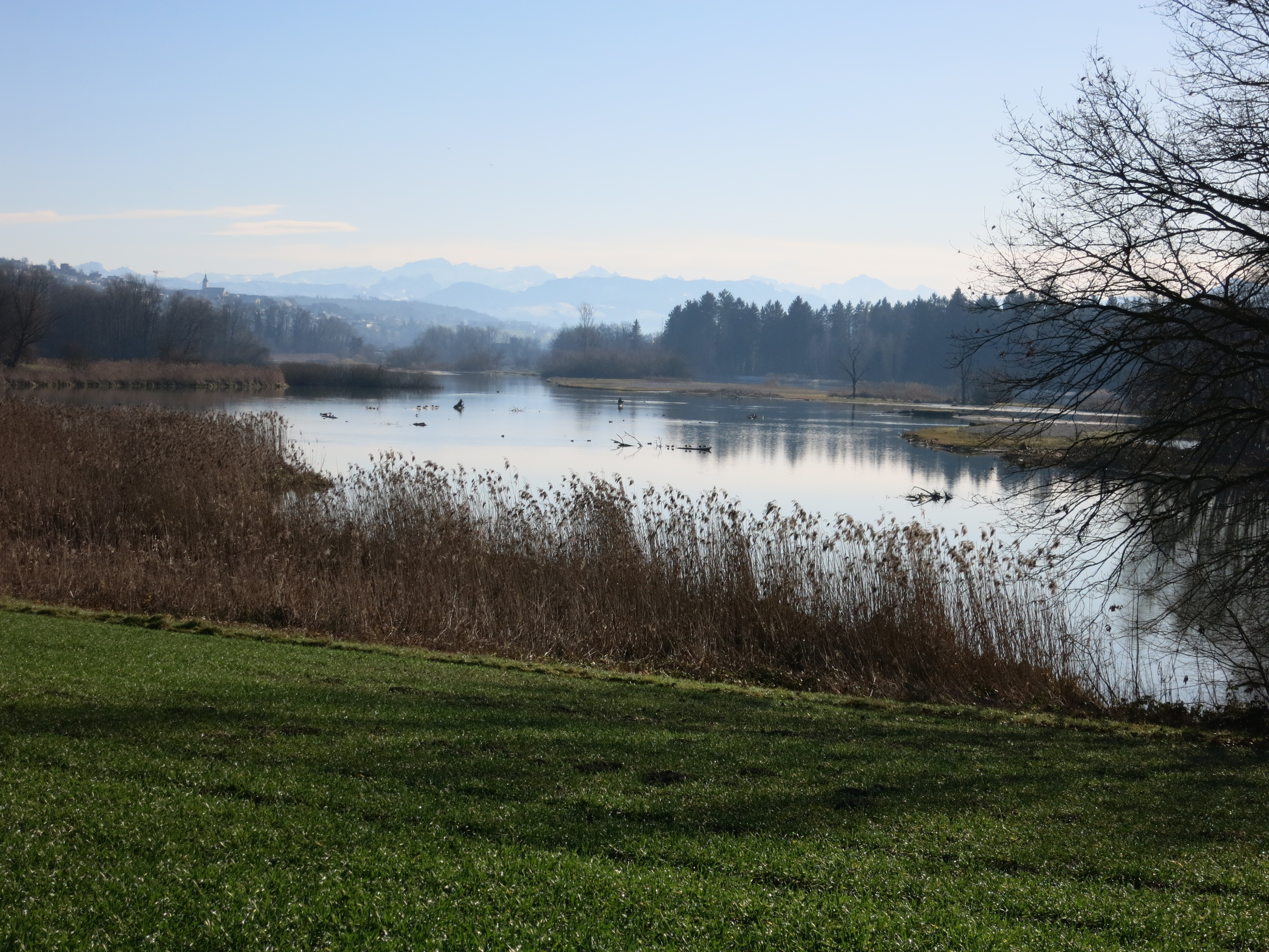 Flachsee, Reuss, Unterlunkhofen AG, Schweiz